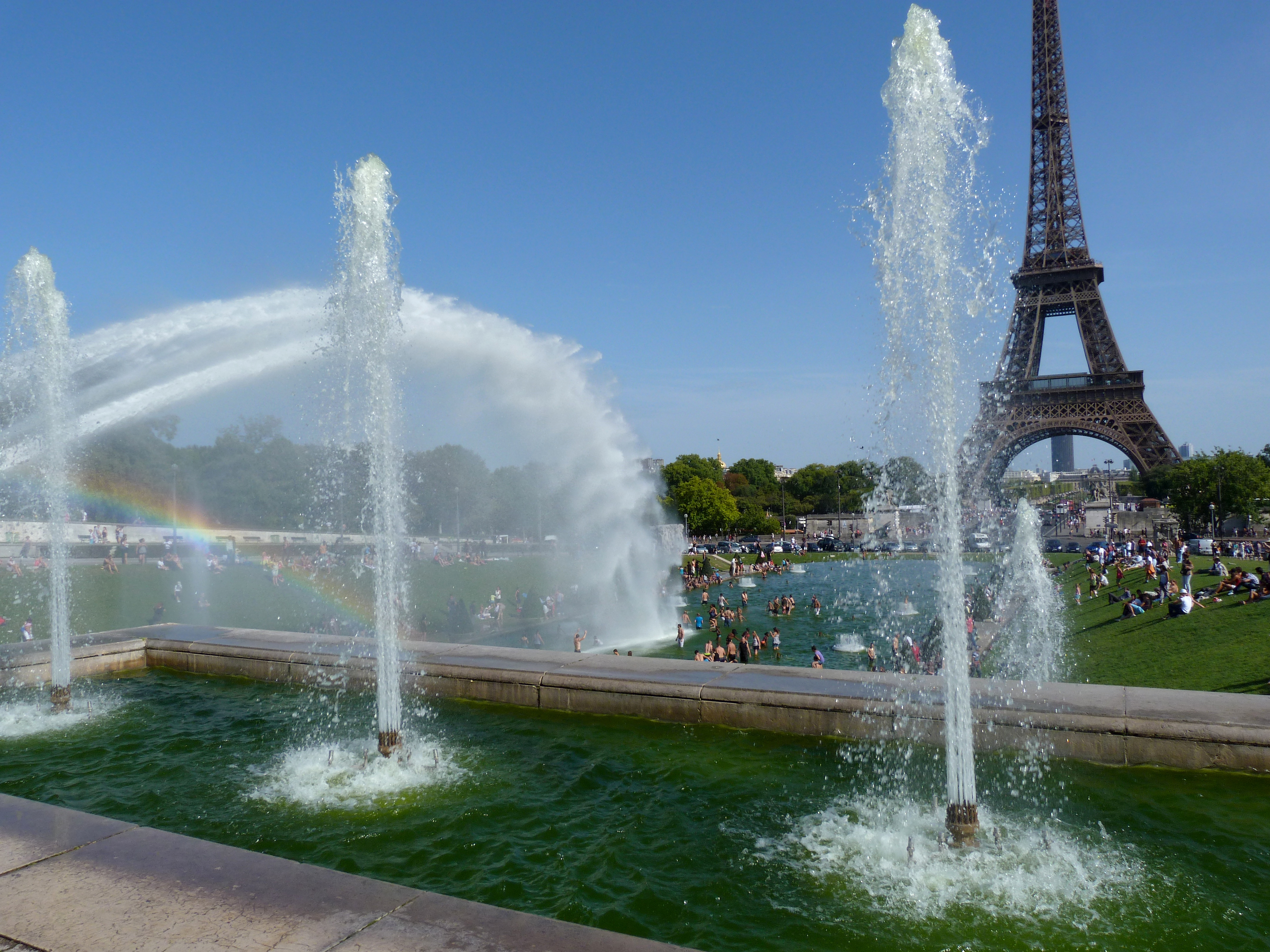 Jardins du Trocadéro, fontaine centrale, canons à eau en action, gens se baignant.